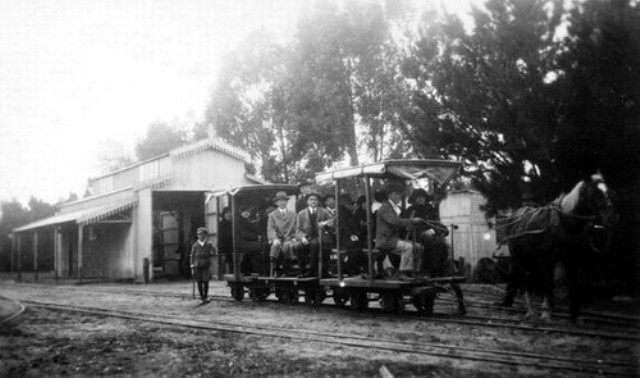 Los trencitos de Piriapolis, Colonia y La Floresta, Viajes